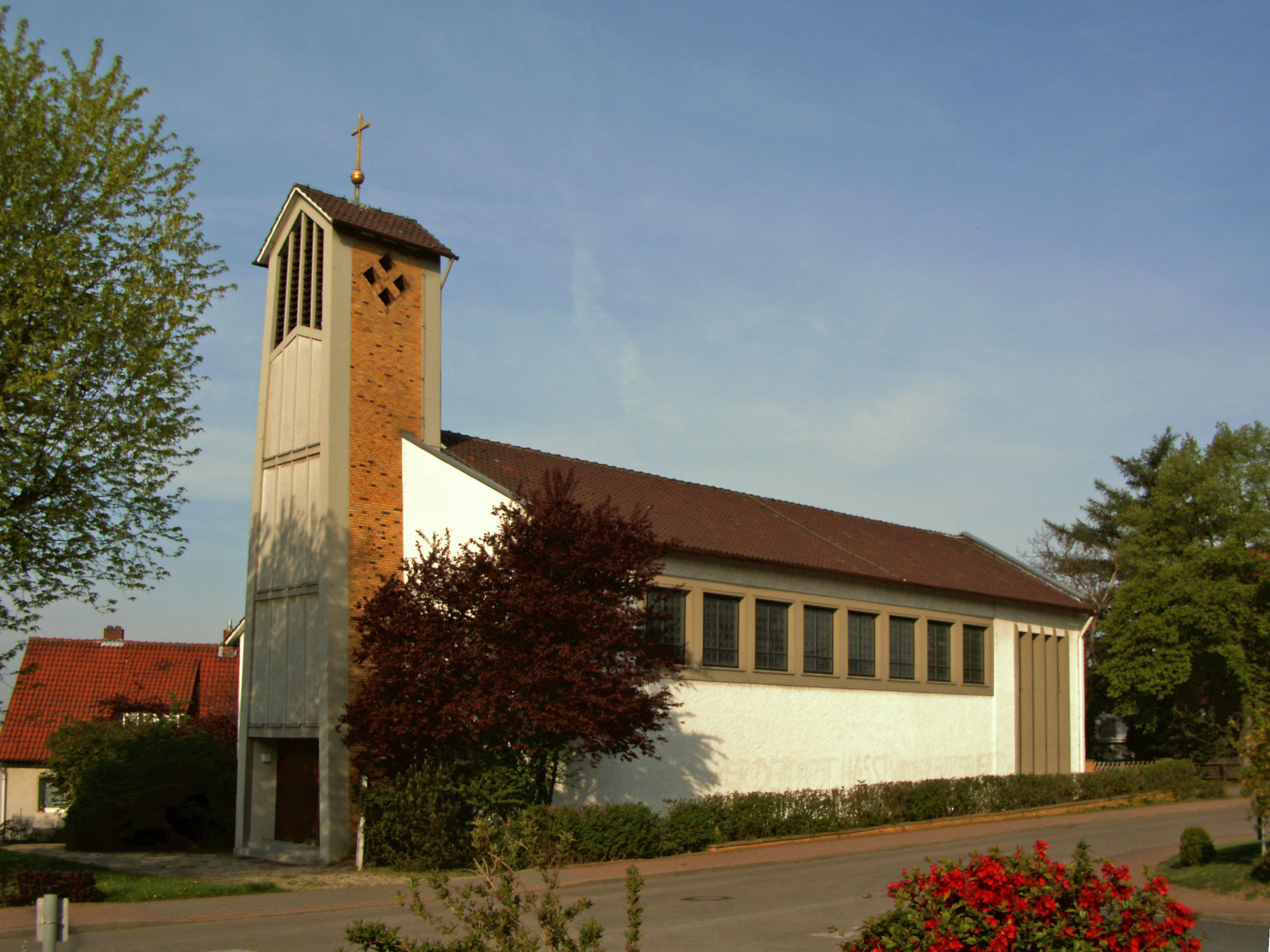 Katholische Kirche St. Bernward in Börßum, Landkreis Wolfenbüttel (20.11.2011 profaniert)